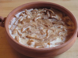 Համբարձման տոնի առիթով պատրաստվող կաթնով